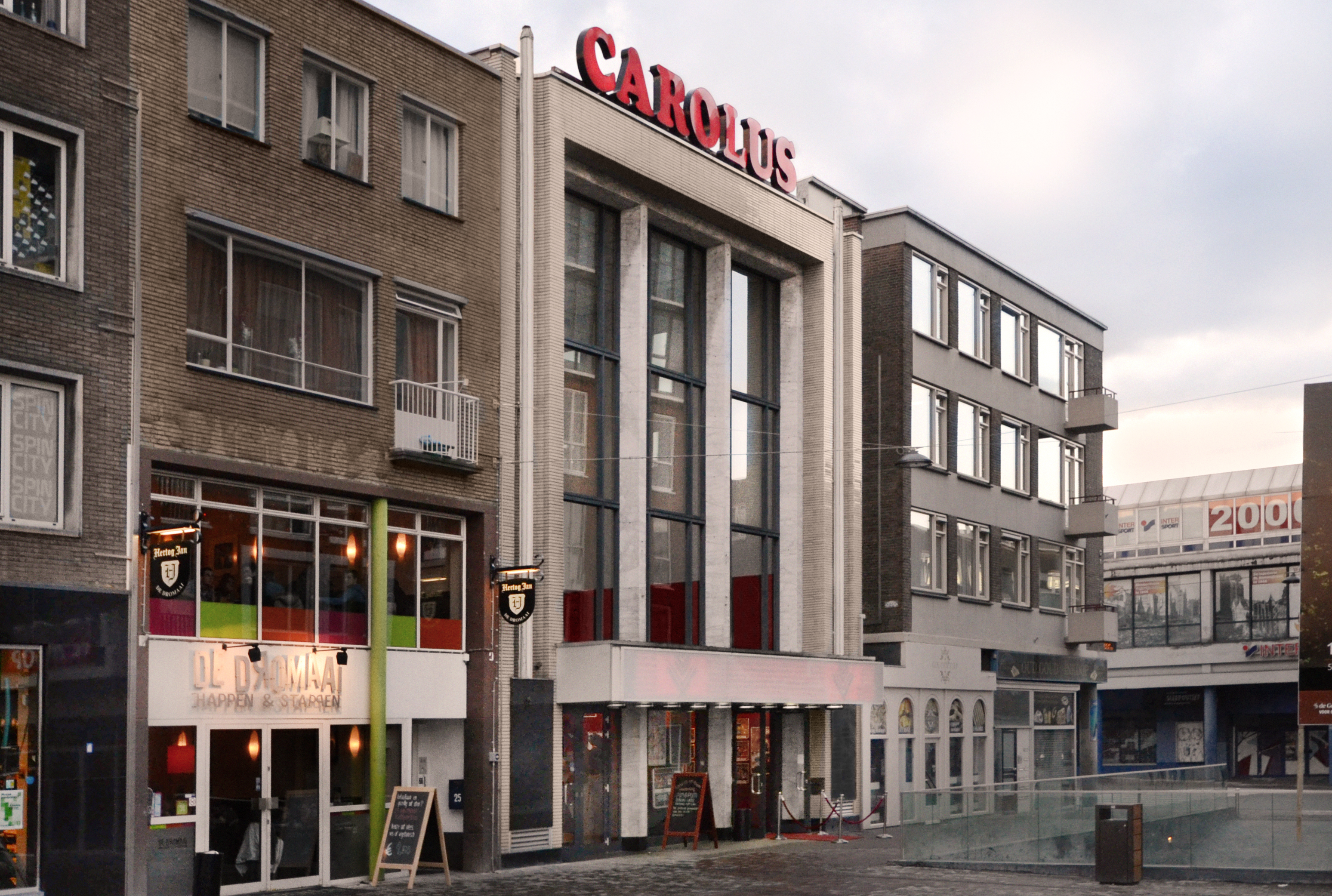 Exterieur bioscoop Carolus anno 2014